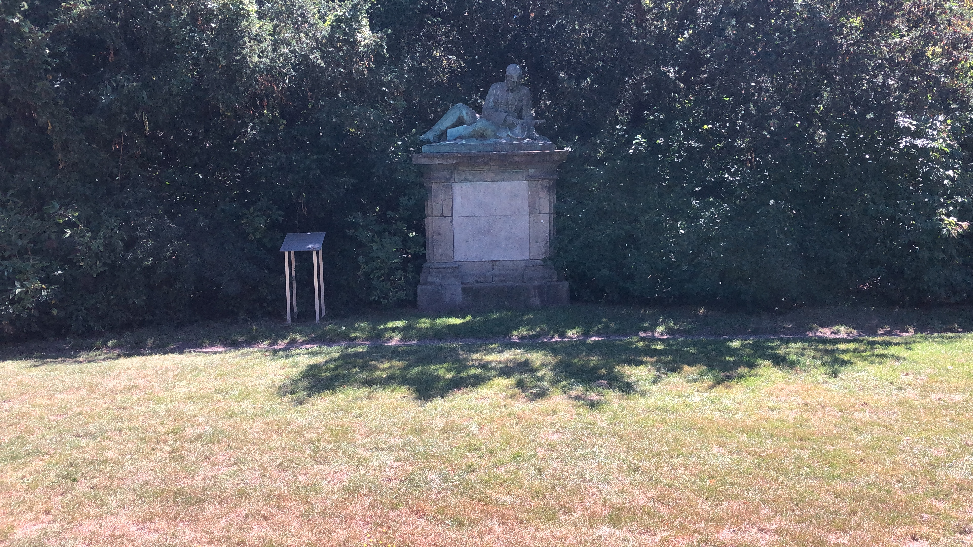 Kolonialkriegerdenkmal Düsseldorf-Derendorf, Ansicht in Grünanlage